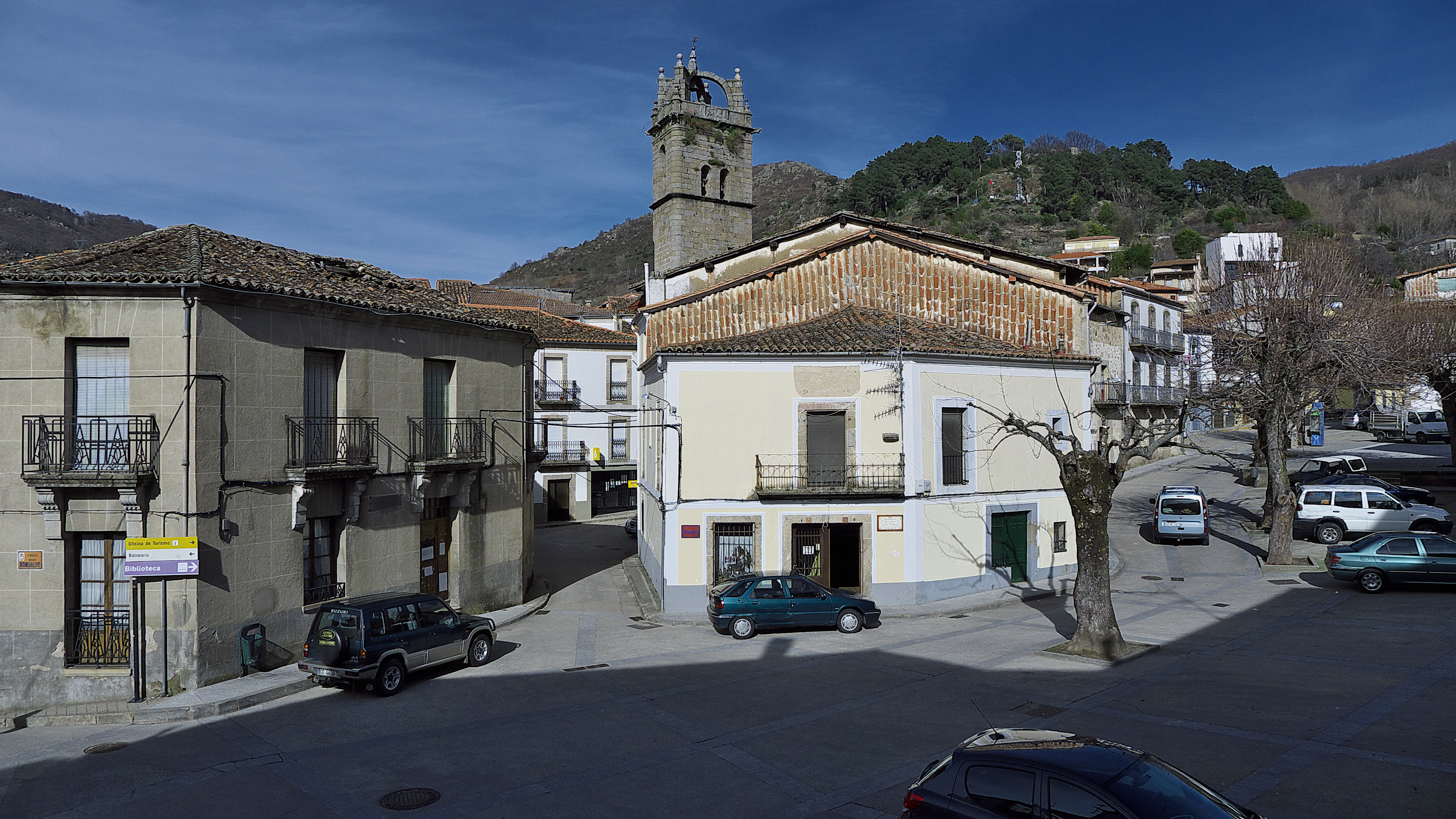 Panorámica de Montemayor.